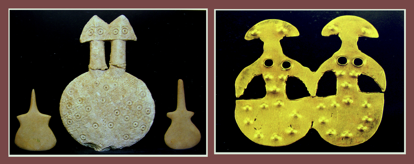 Istennőidolok (Anatóliai Civilizációk Múzeuma, Ankara, Törökország)